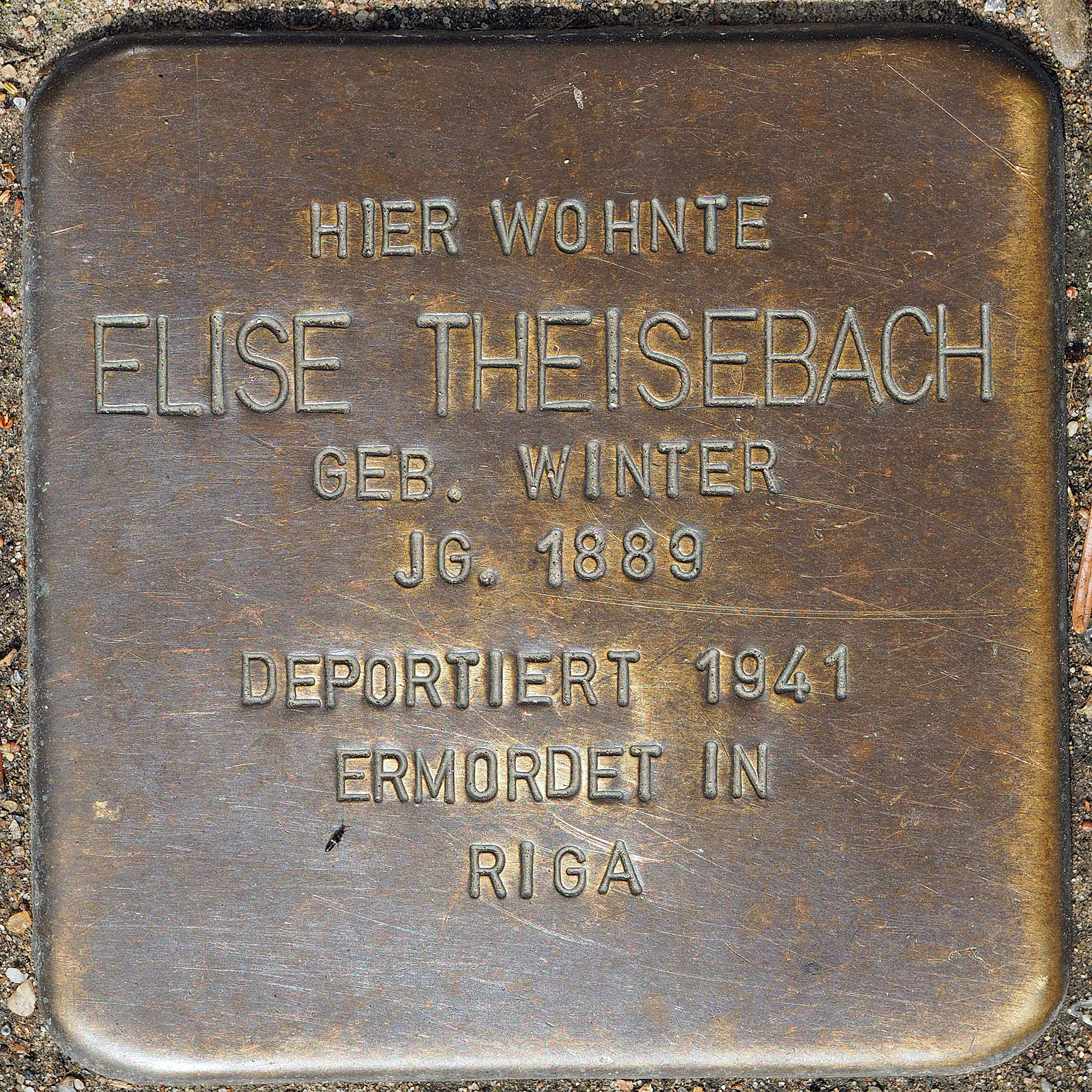 Stolpersteine GV: Theisebach, Elise